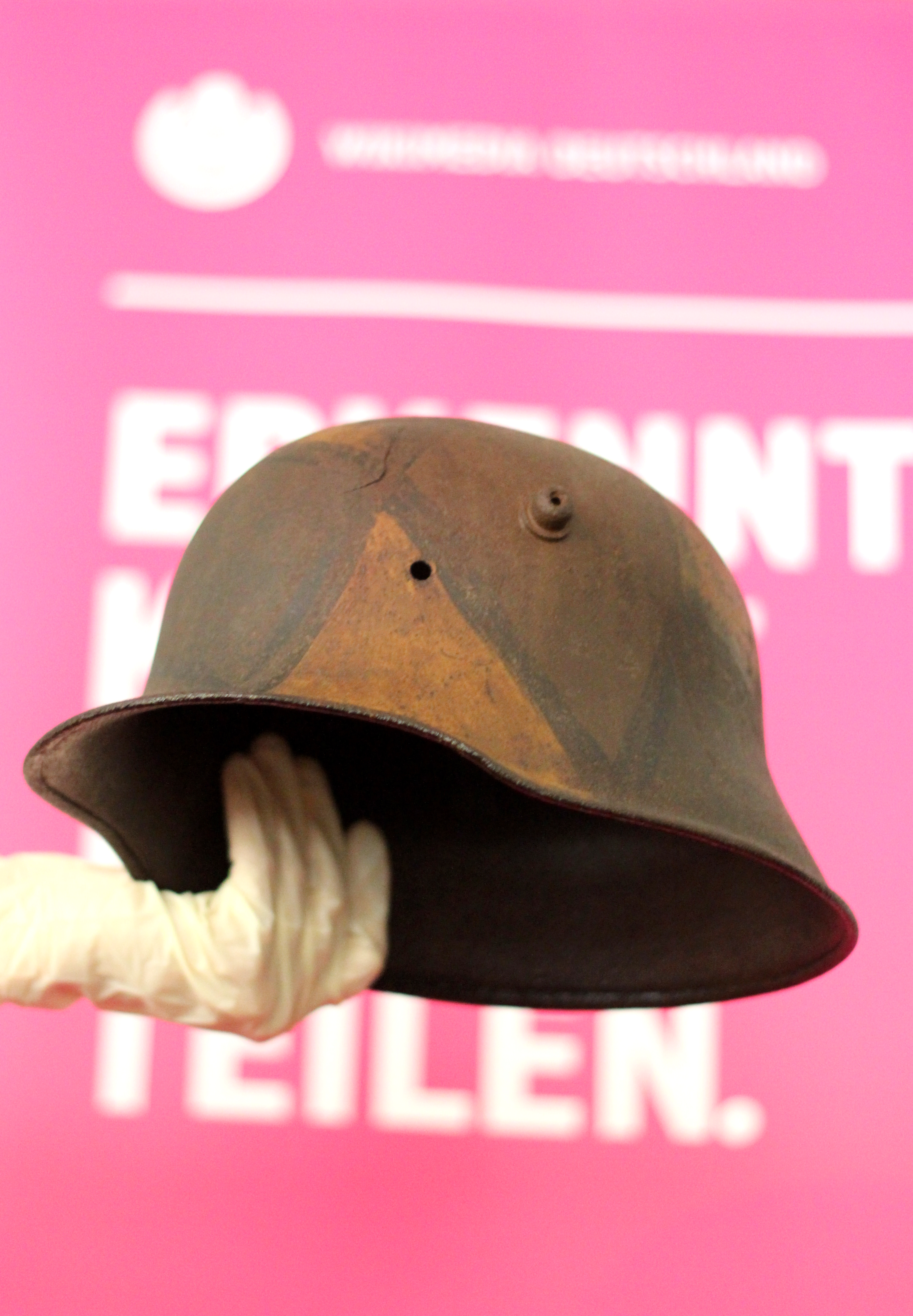 Braunschweigisches Landesmuseum. Wikimedia Deutschland. Juni 2014.